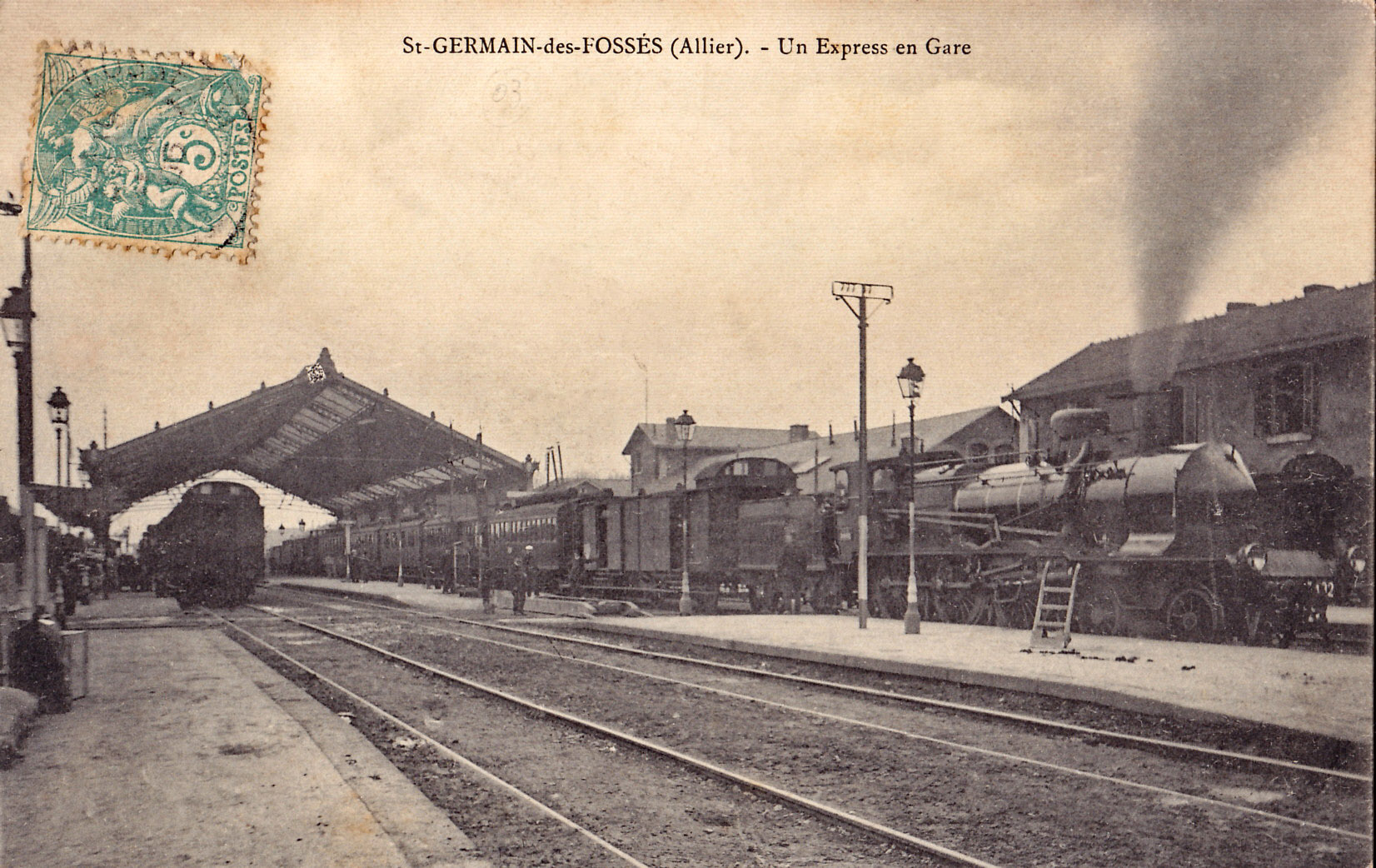 Carte postale ancienne sans mention d'éditeur :St-GERMAIN-des-FOSSES - Un Express en Gare